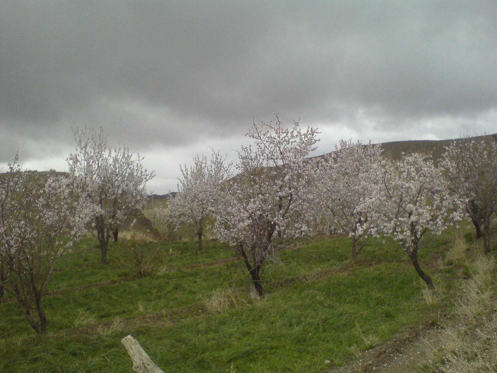 درختان بادام در بهار روستای موشک